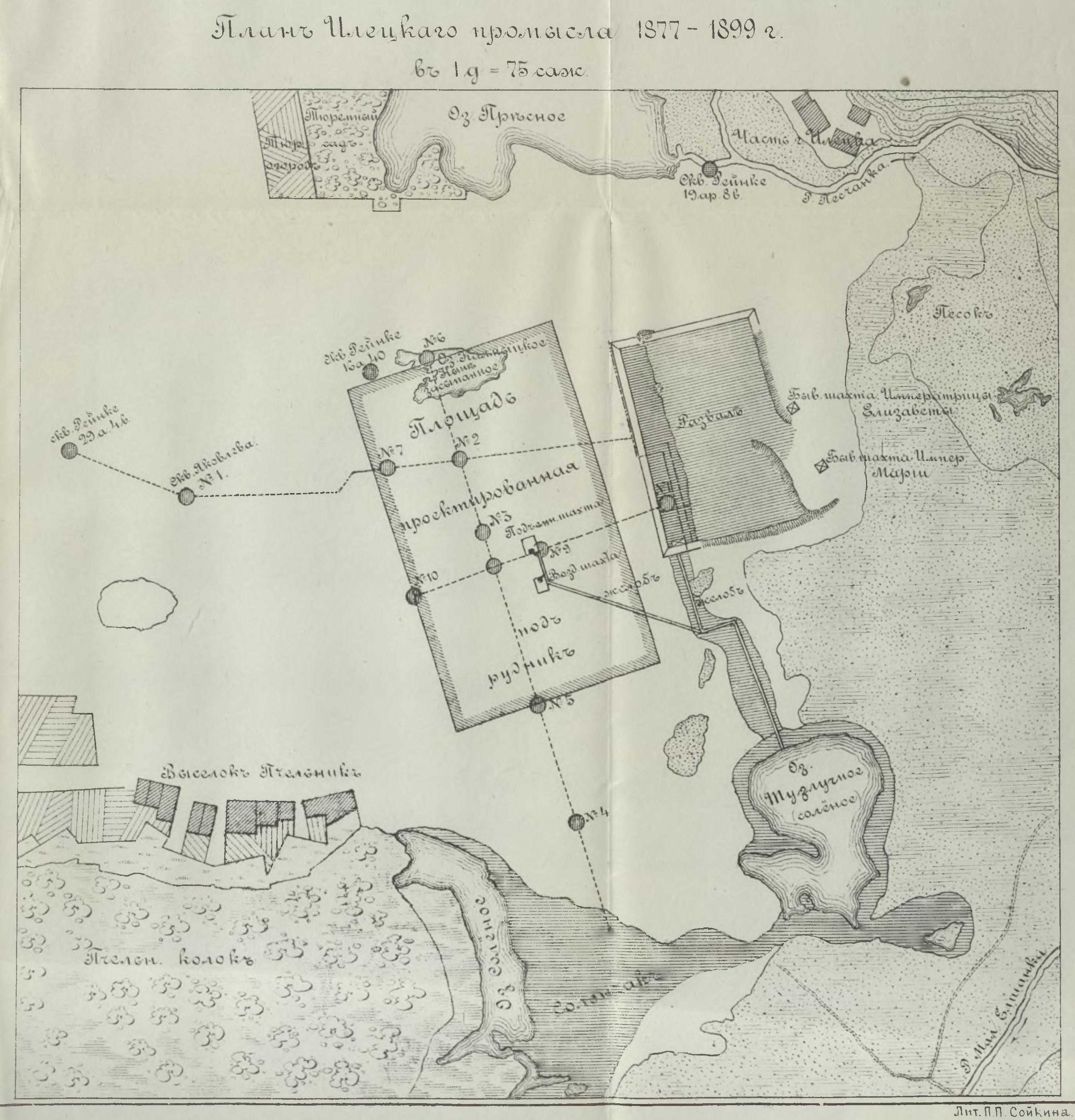 Горный журнал, издаваемый горным ученым комитетом. — Санкт-Петербург, 1901.